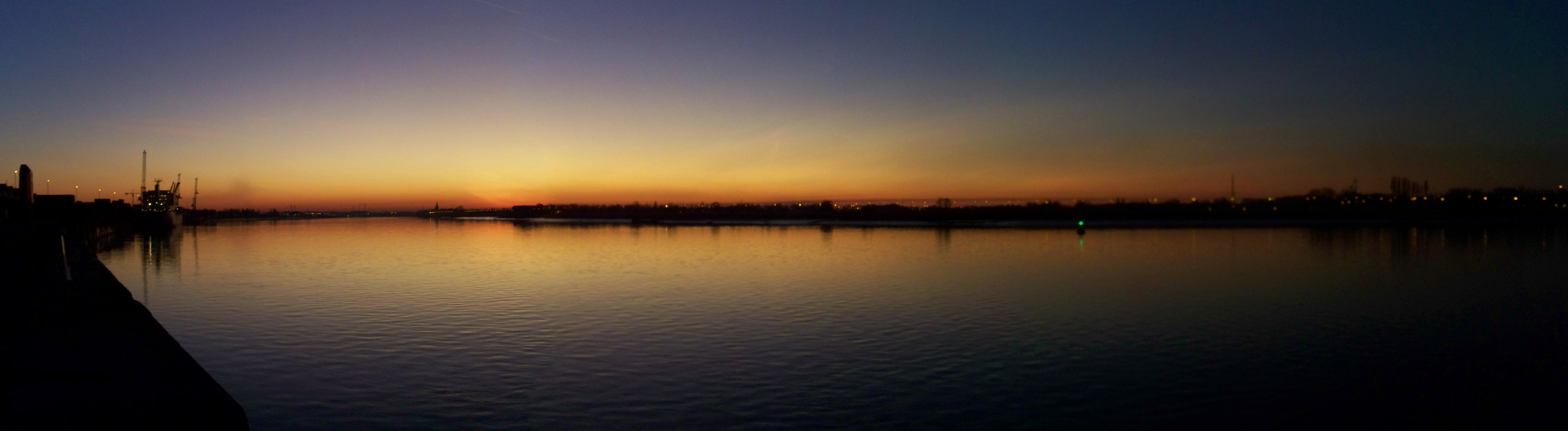 River Scheldt in Antwerp at sunset.